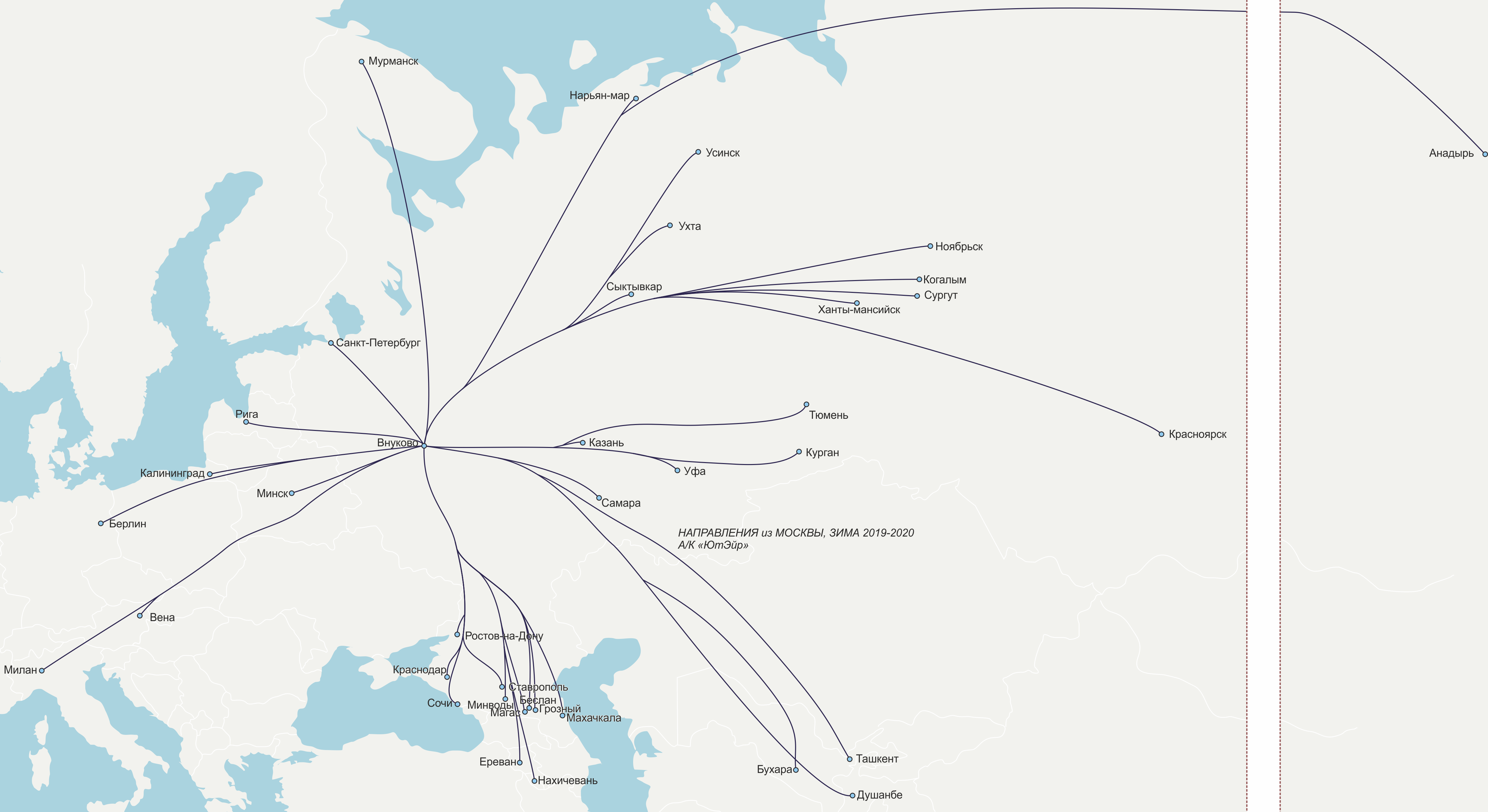 рейсы расписания зима 2019-2020